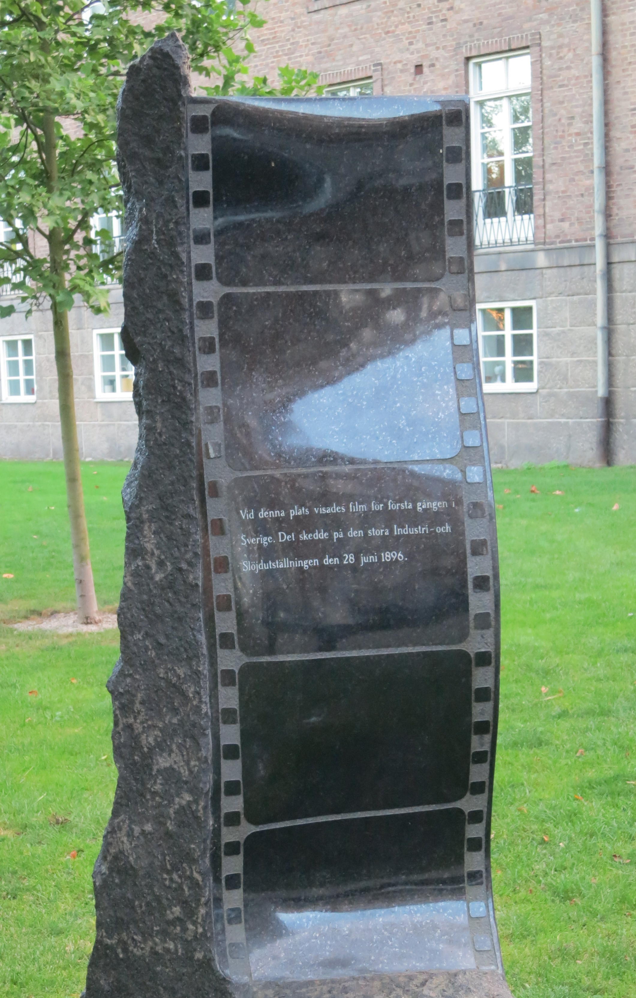 Filmen 100 år, monument i området Hästhagen i Malmö